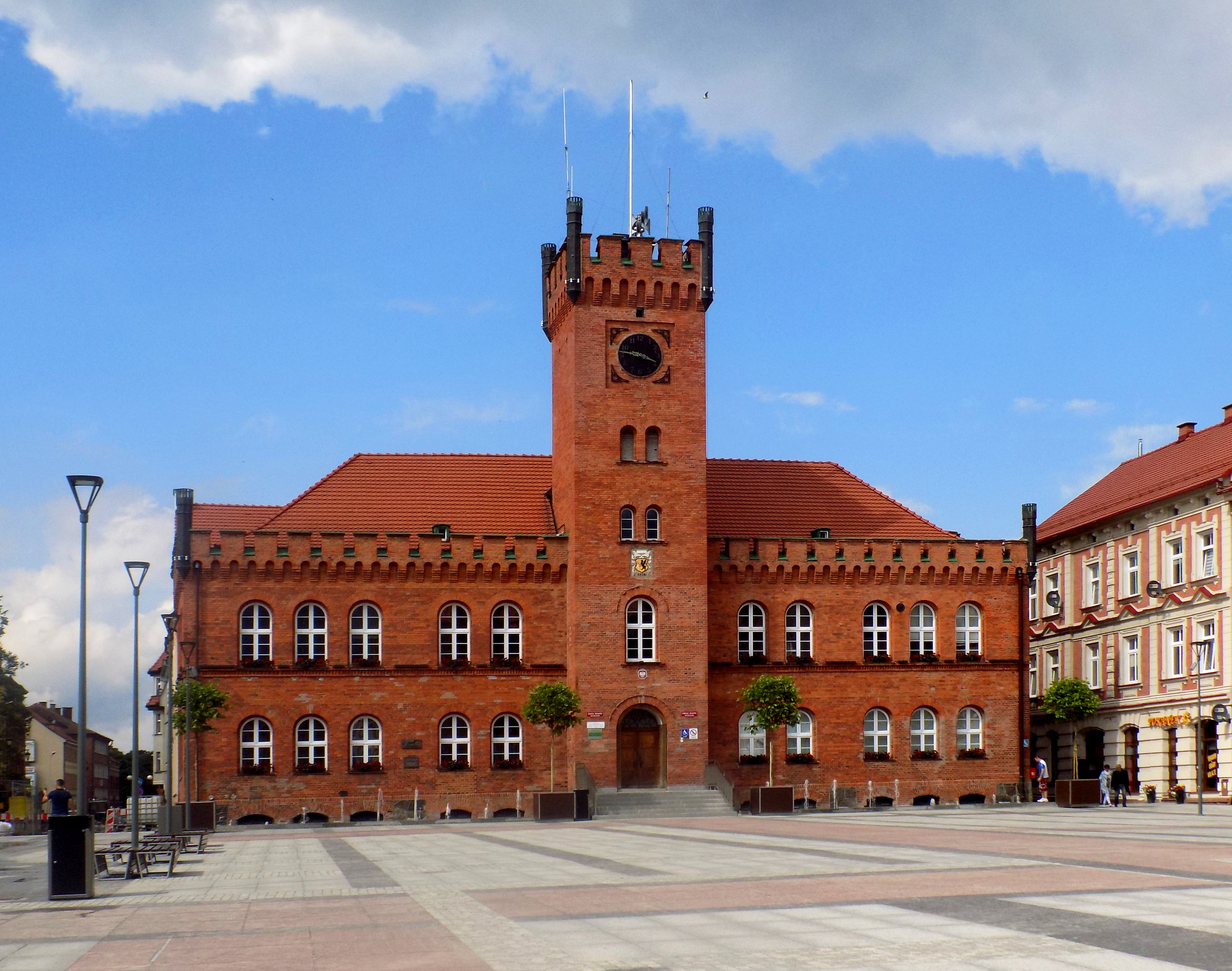 Szczecinek, Śródmieście miasta Wikidata has entry Q33329298 with data related to this item.